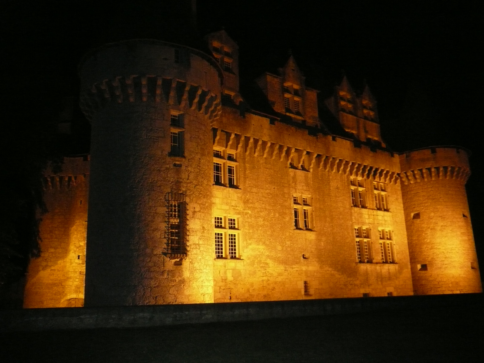 Château de Monbazillac en nocturne